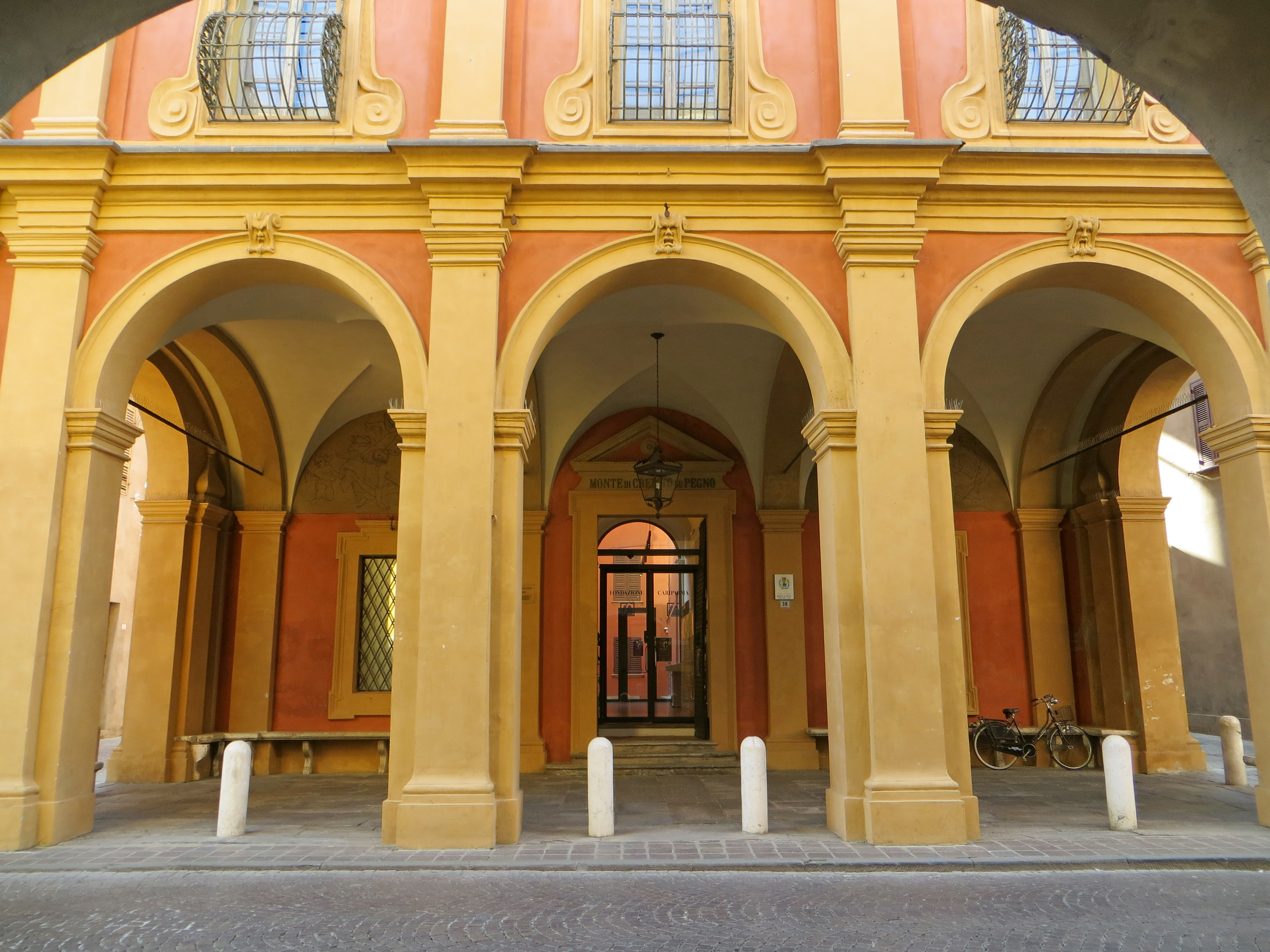 Palazzo del Monte di Pietà (Busseto) - porticato